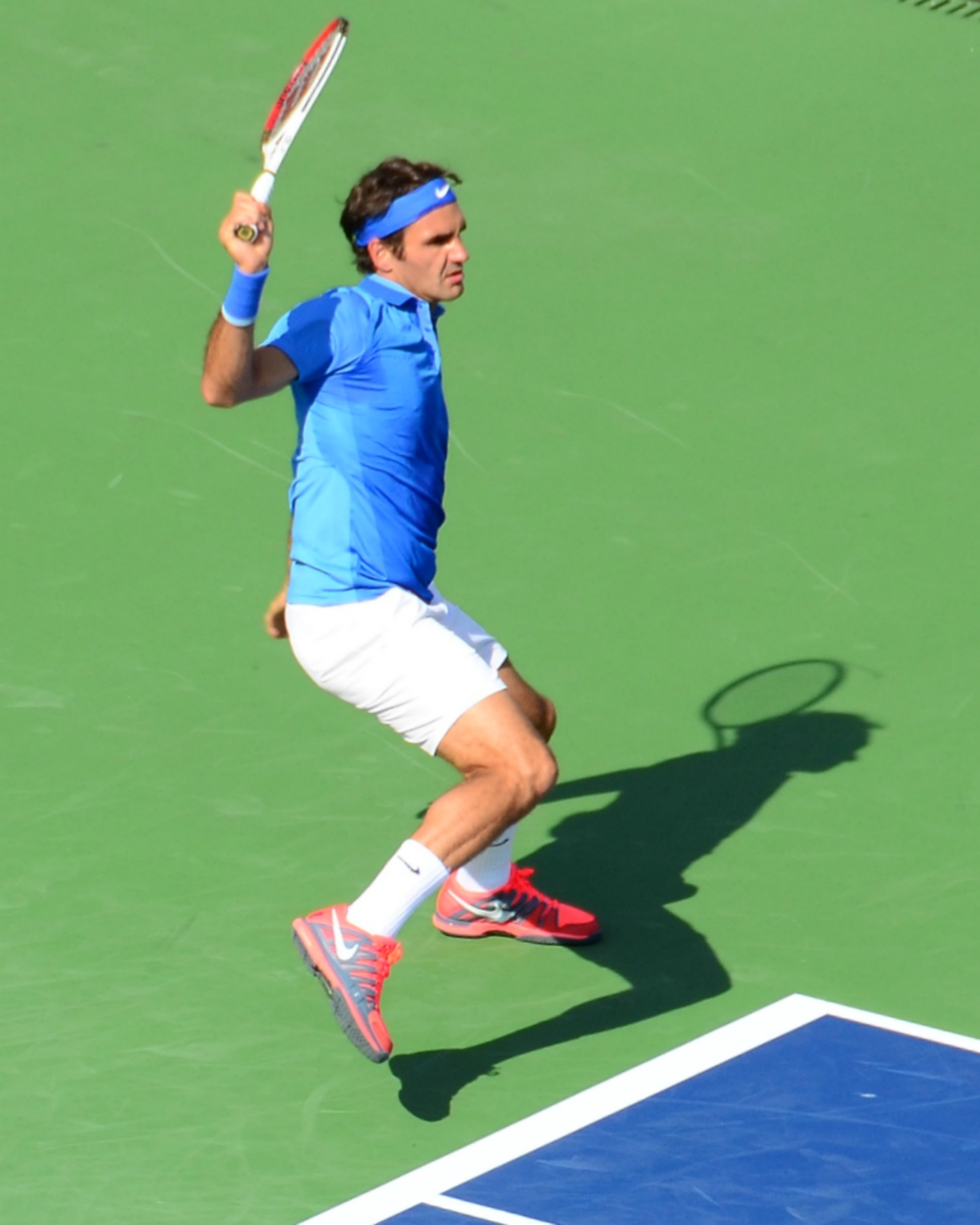 Roger Federer